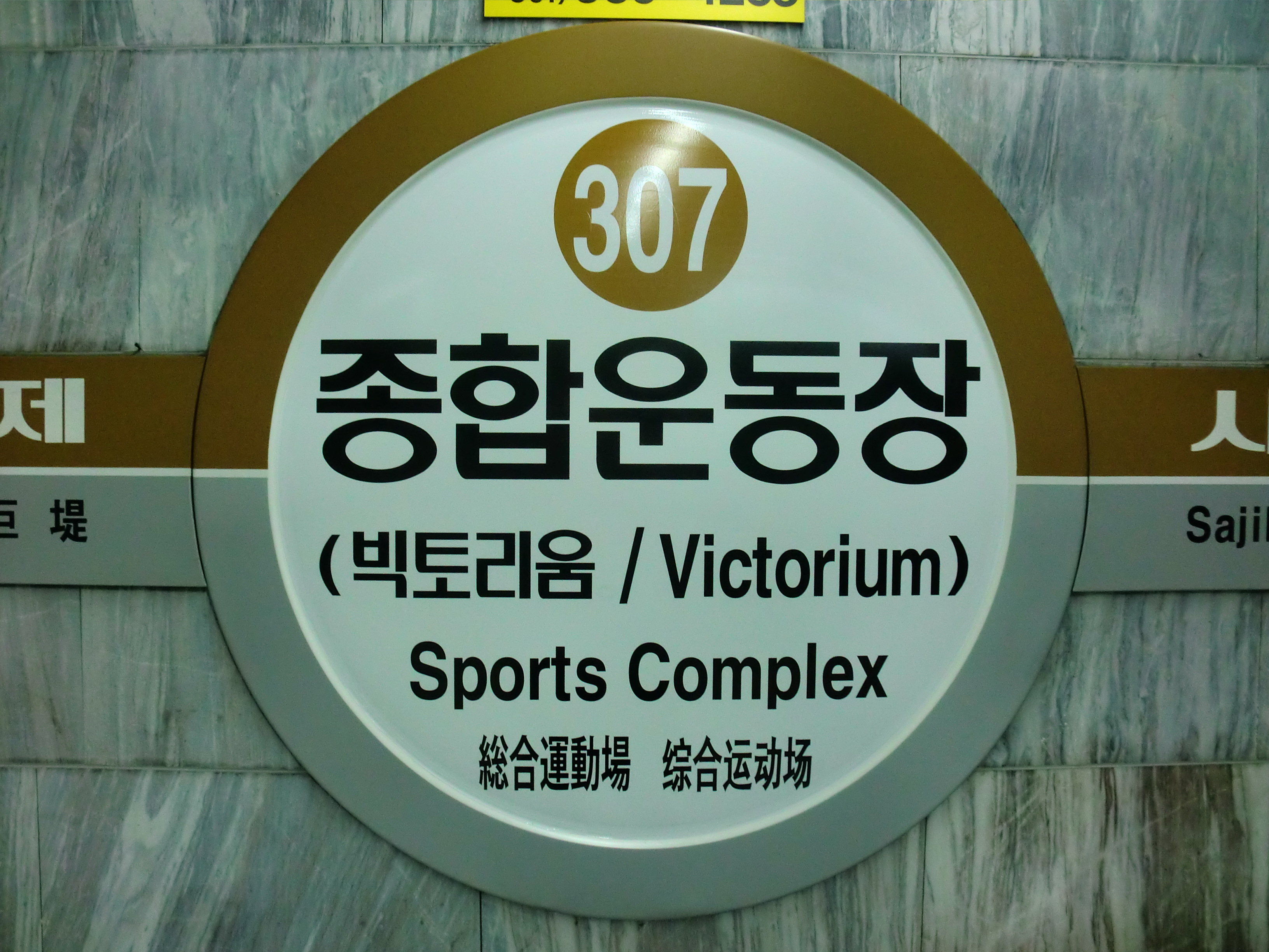 부산도시철도3호선 종합운동장역의 역명판